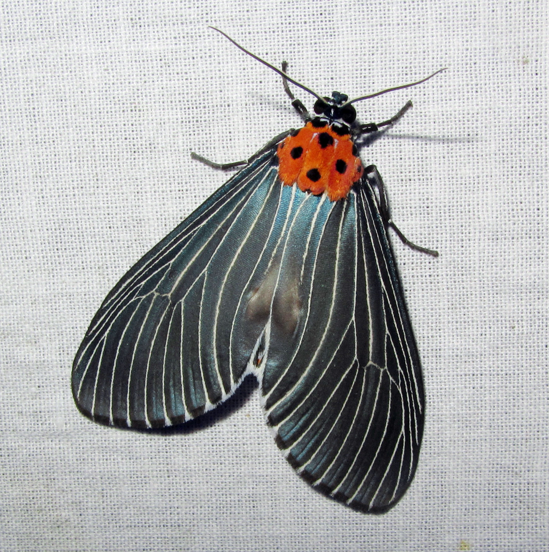 Langka, East kameng, Arunachal Pradesh, 11 April 2012